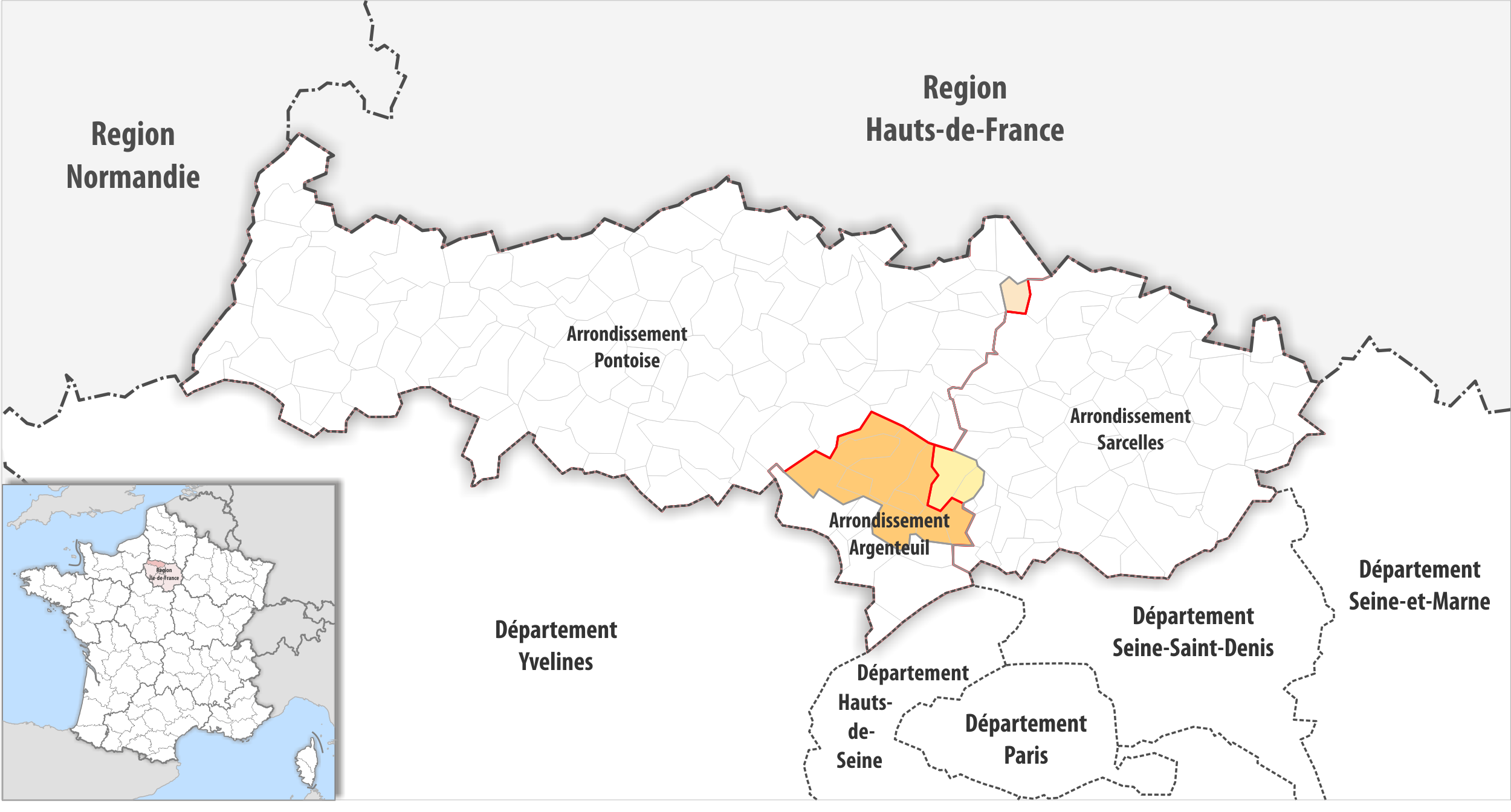 Arrondissements Anpassungen auf 2017 im Departement Val-d’Oise